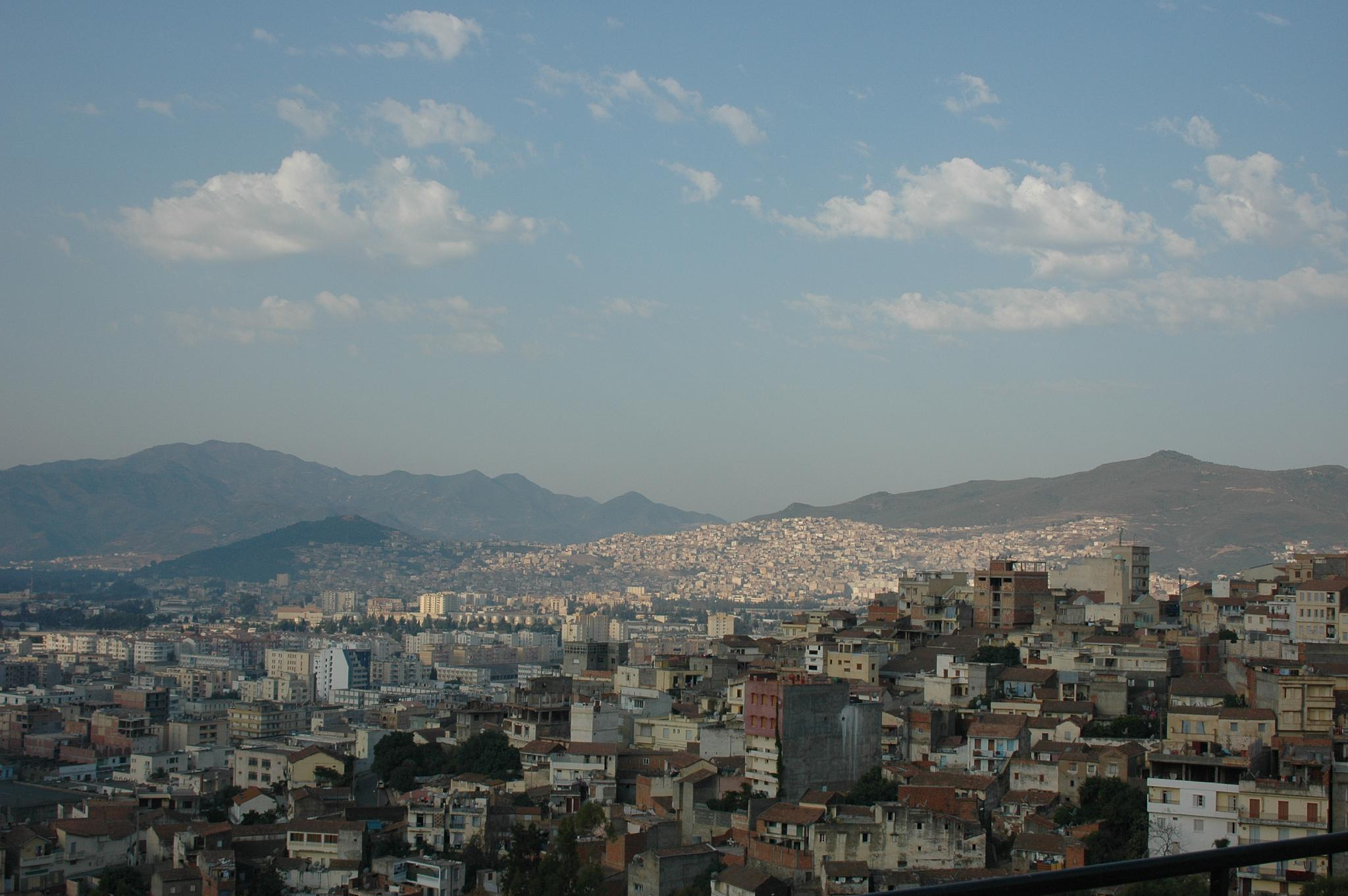 Vue depuis la casbah de Béjaïa, en Algérie.